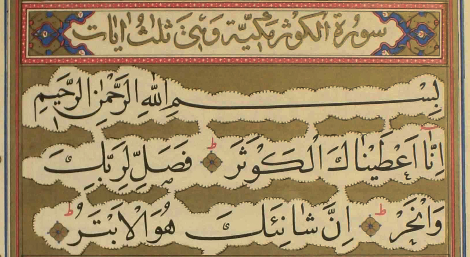 کتابت: 1117 ه.ق، اواخر دوره صفوی نگاه‌داری‌شده در کتابخانهٔ کاخ گلستان معروف به قرآن آریامهری یا پهلوی